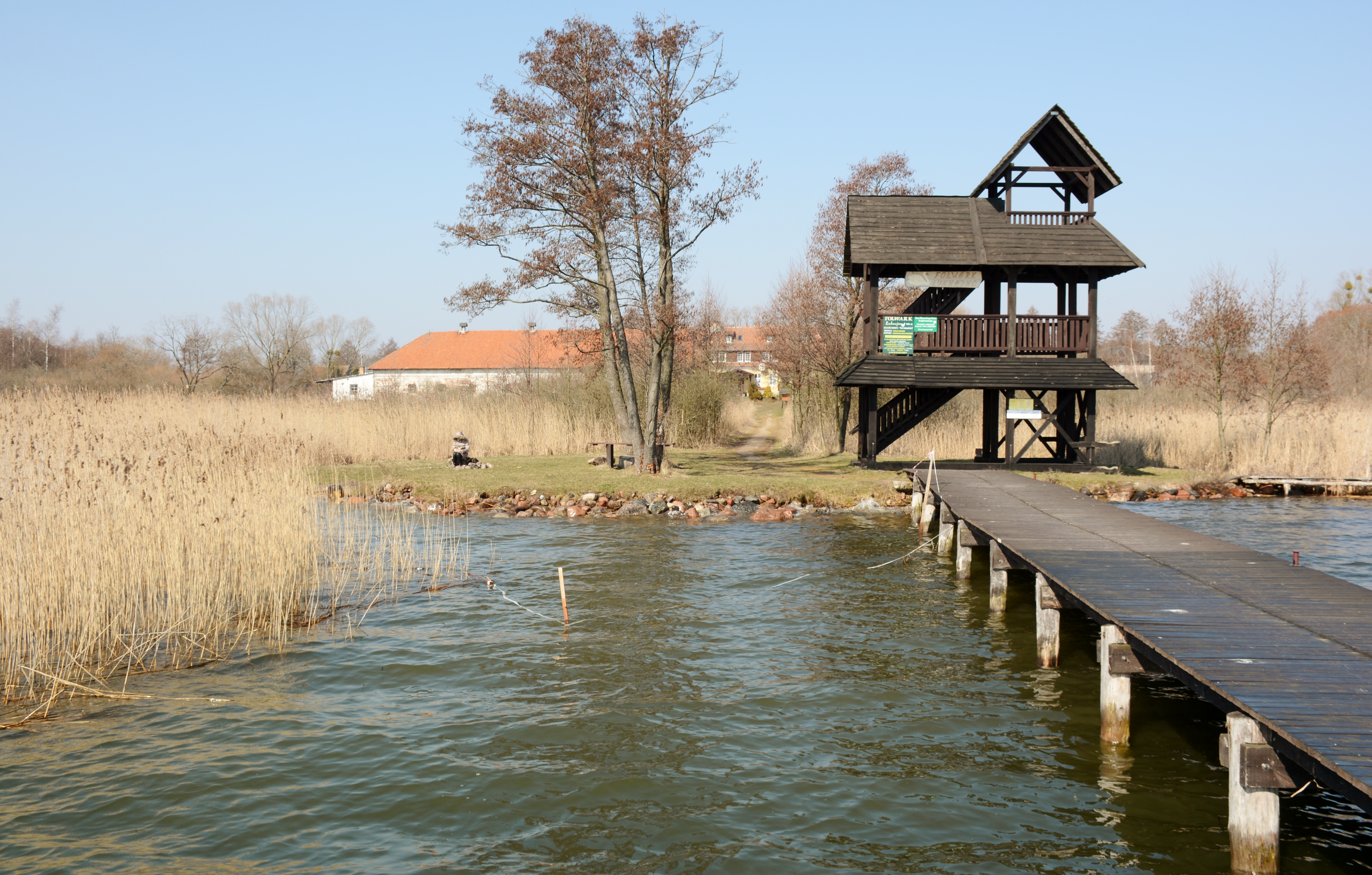 Luknajno,Gmina-Mikolajki,Polska,UE.